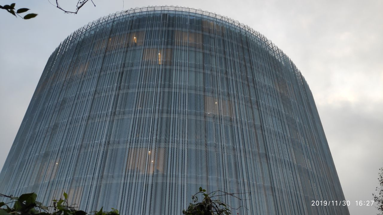 Un edificio del Campus Bocconi (28 novembre 2019)